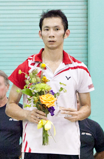 Nguyễn Tiến Minh (Vietnamese National Badminton Player) at 2011 US Open (badminton).